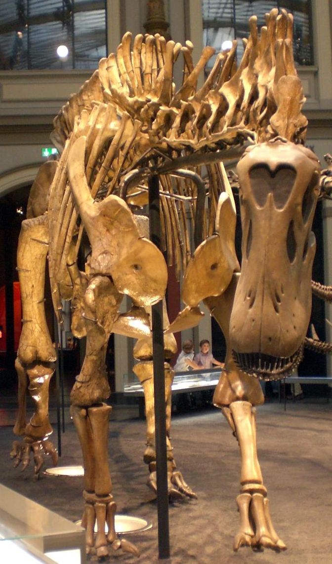 Naturkundemuseum Berlin